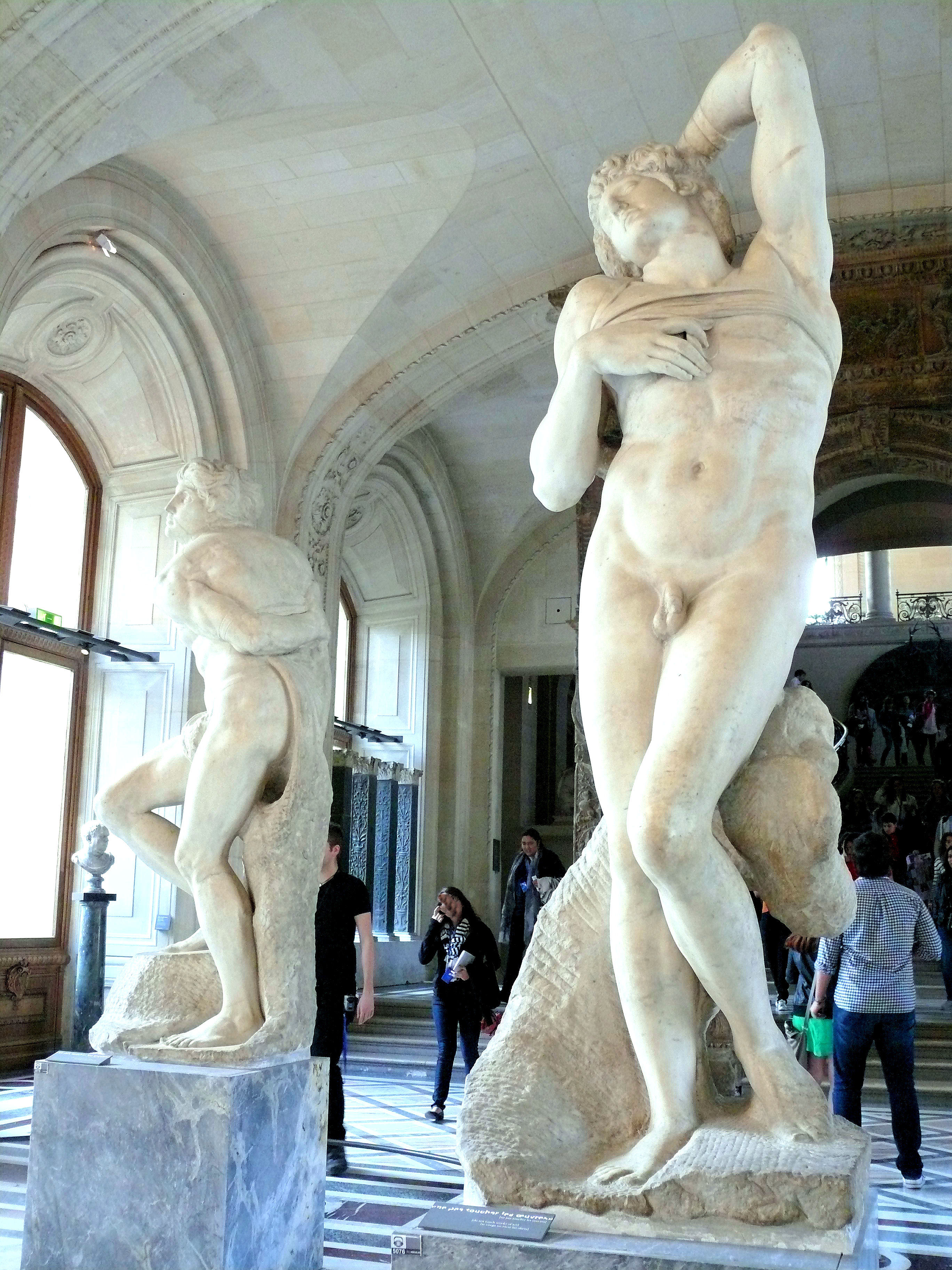 Musée du Louvre - Galerie Michel-Ange - Les Esclaves : Captif dit L'Esclave mourant de Michel-Ange